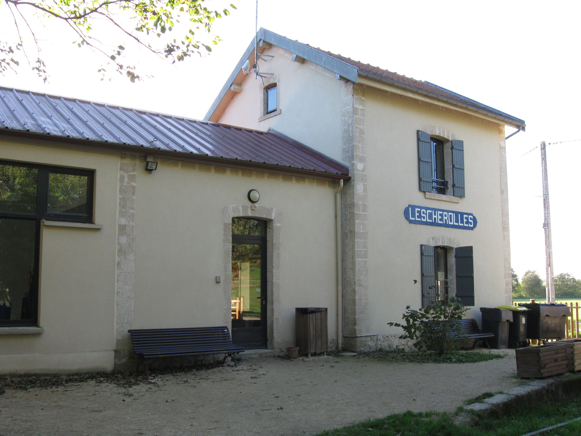 Ancienne gare de Lescherolles (département de la Seine-et-Marne, région Île-de-France).